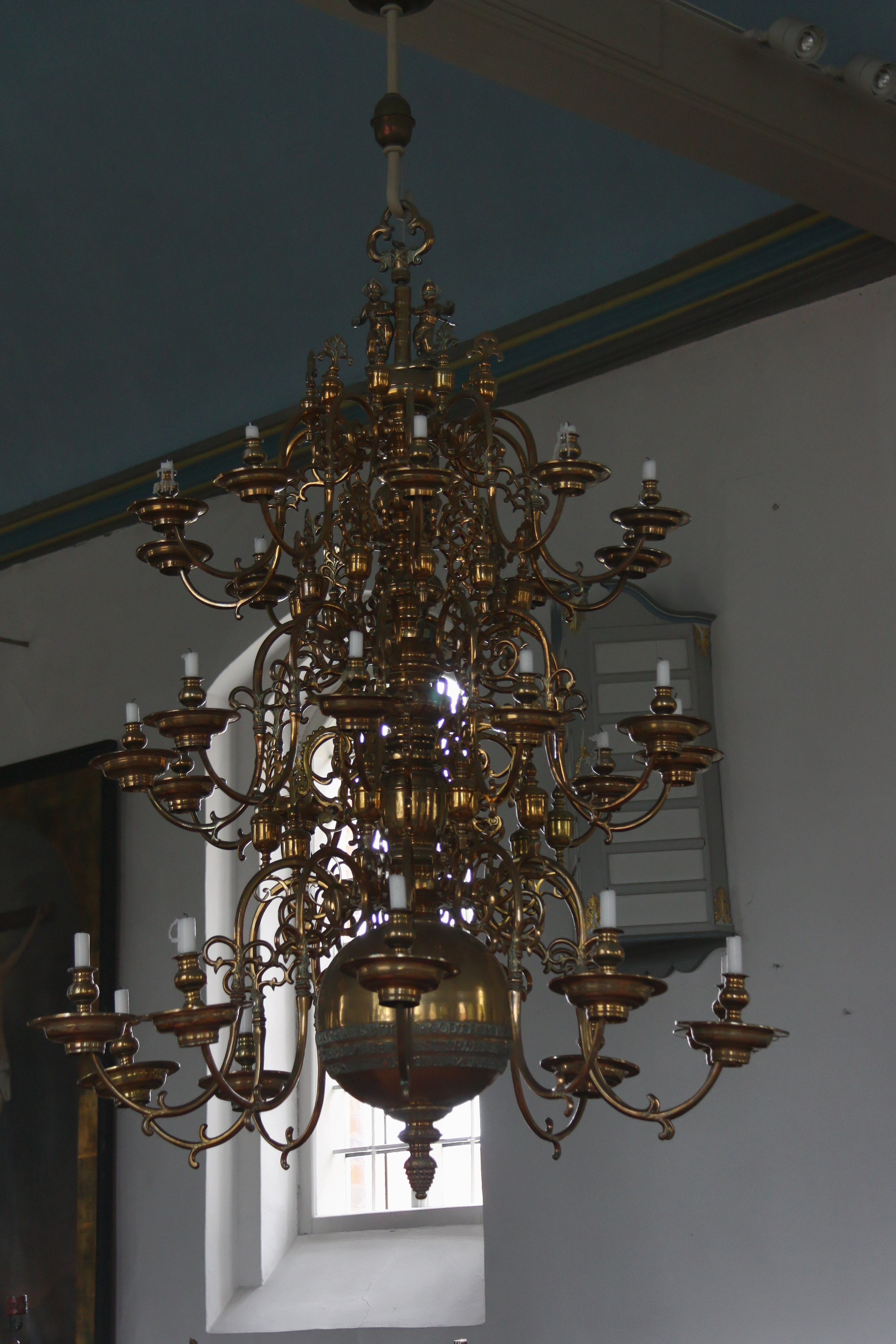 Sankt Johannis, Hamburg-Neuengamme, KronleuchterThis is a photograph of an architectural monument.